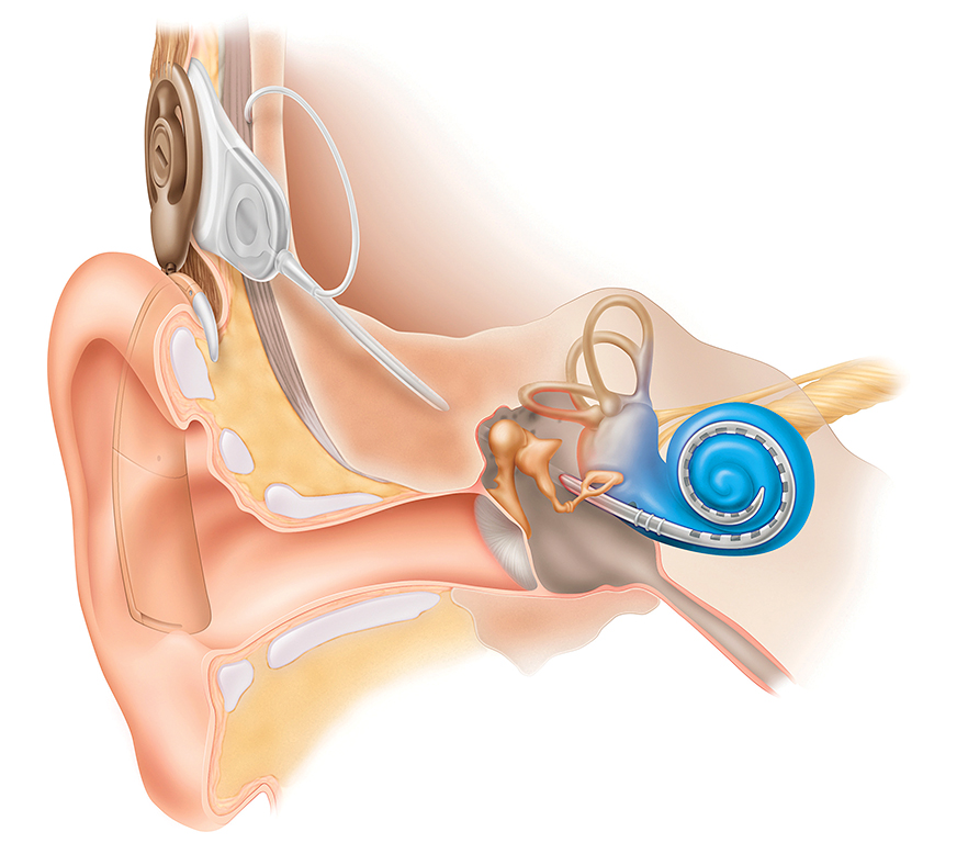 Implantatet placeras under huden bakom örat. Elektrodraden placeras i hörsnäckan via mellanörat. 1. Ljudprocessorn tar upp ljud och omvandlar den till en digital signal. 2. Ljudprocessorn skickar det digitalt kodade ljudet till implantatet under huden via sändarspolen. 3. Implantatet tar emot signalen via sin mottagarspole, omvandlar det digitalt kodade ljudet och sänder ut signaler via elektrodraden. 4. Elektrodraden stimulerar hörsnäckans nervfibrer vilka skickar signaler vidare till hjärnan som producerar hörupplevelsen.